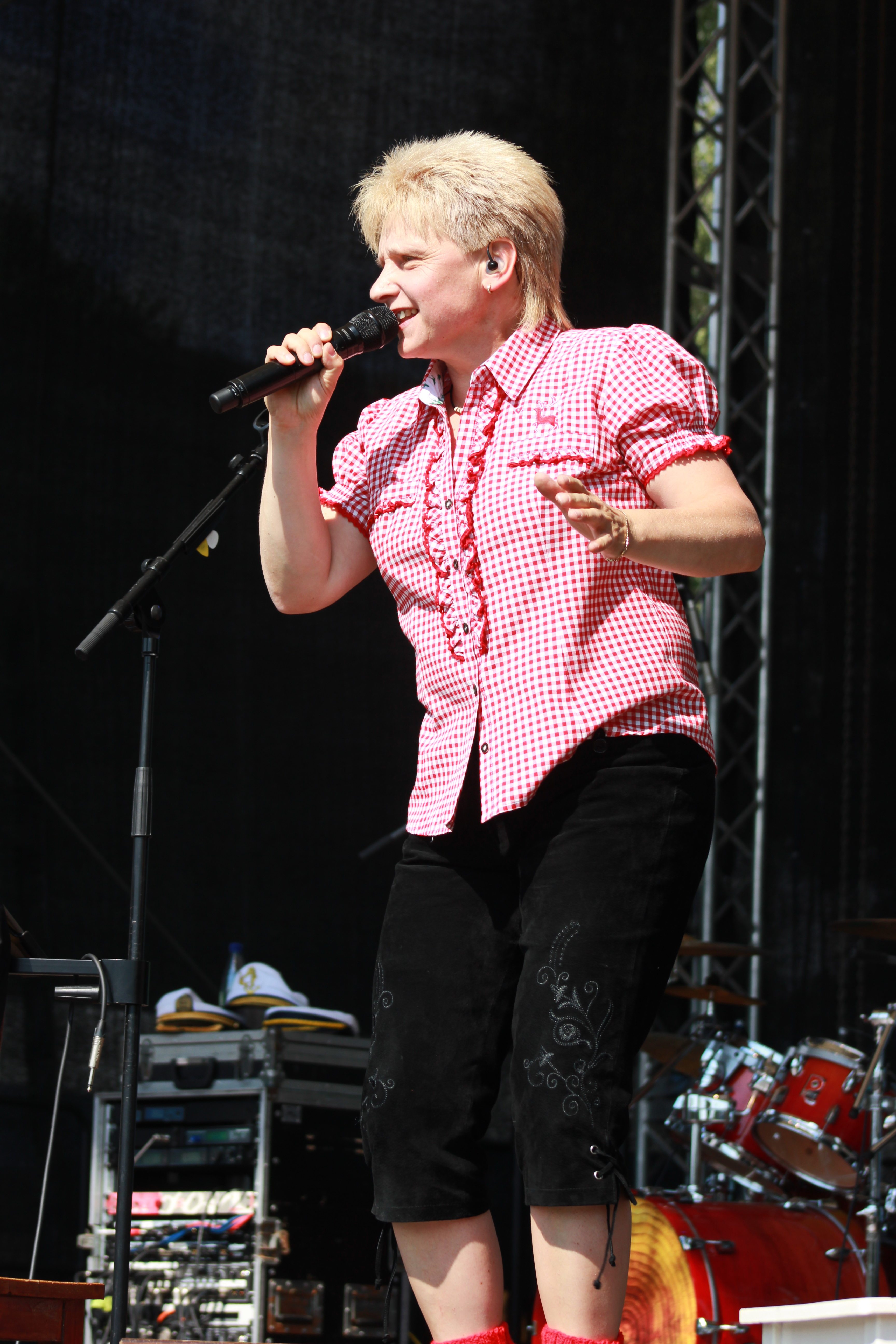 Gruppe Randfichten im Erzgebirge. Veranstaltung in Oelsnitz. Landesgartenschau 2015.